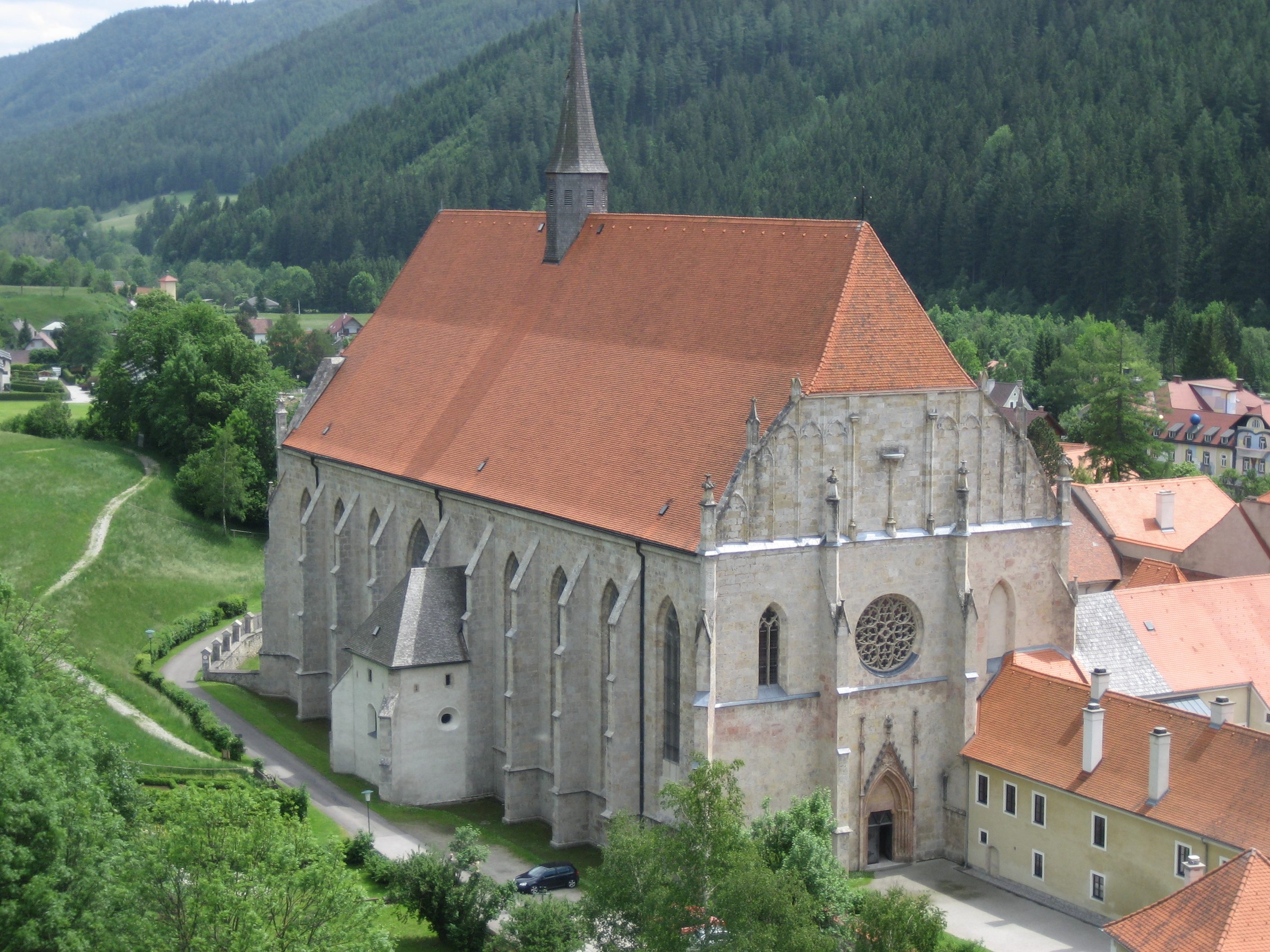 Ehemaliges Stift Neuberg an der Mürz, Steiermark, Österreich (Neuberg an der Mürz, Styria, Austria)